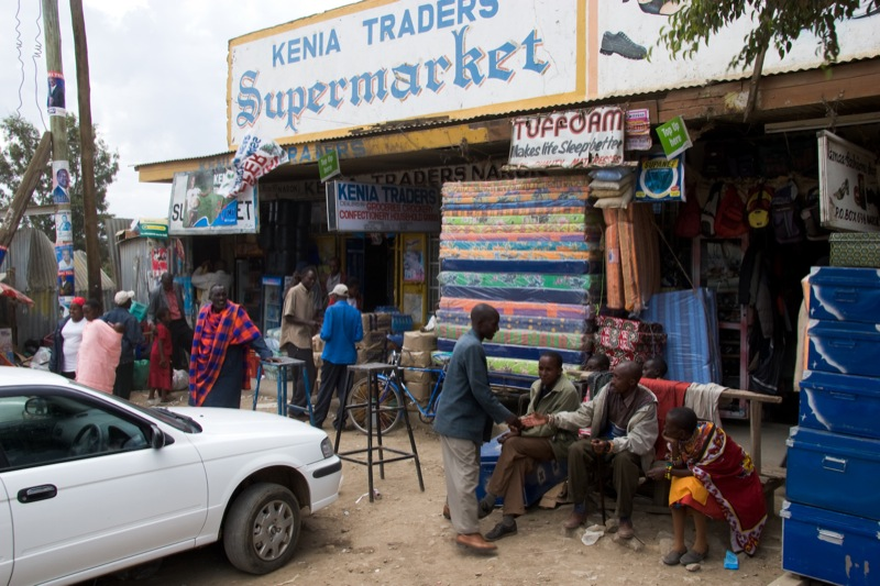 Djoser junior trip to Kenya